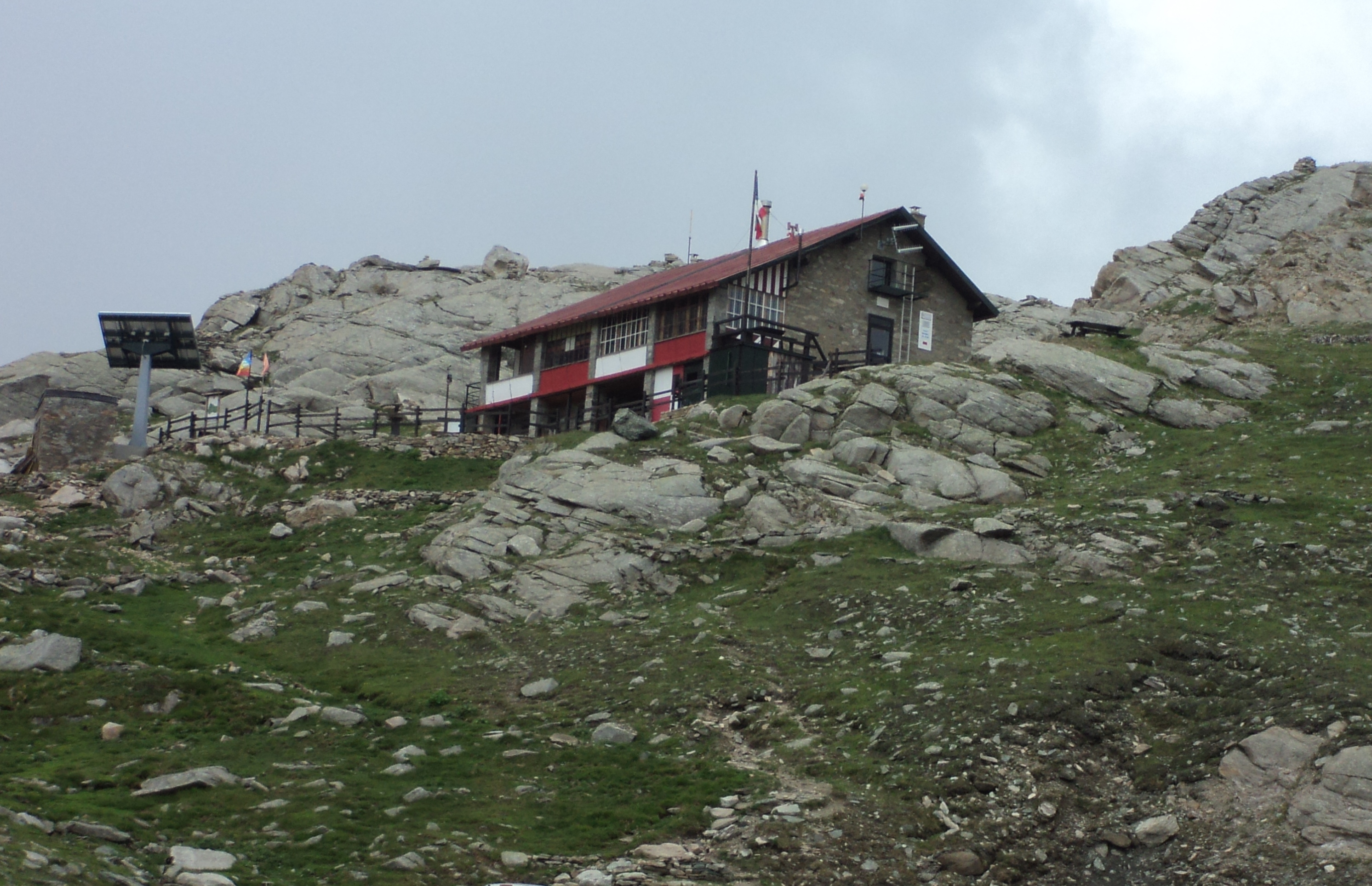 Rifugio Città di Chivasso nei pressi del Colle del Nivolet. Valsavaranche. Valle d'Aosta